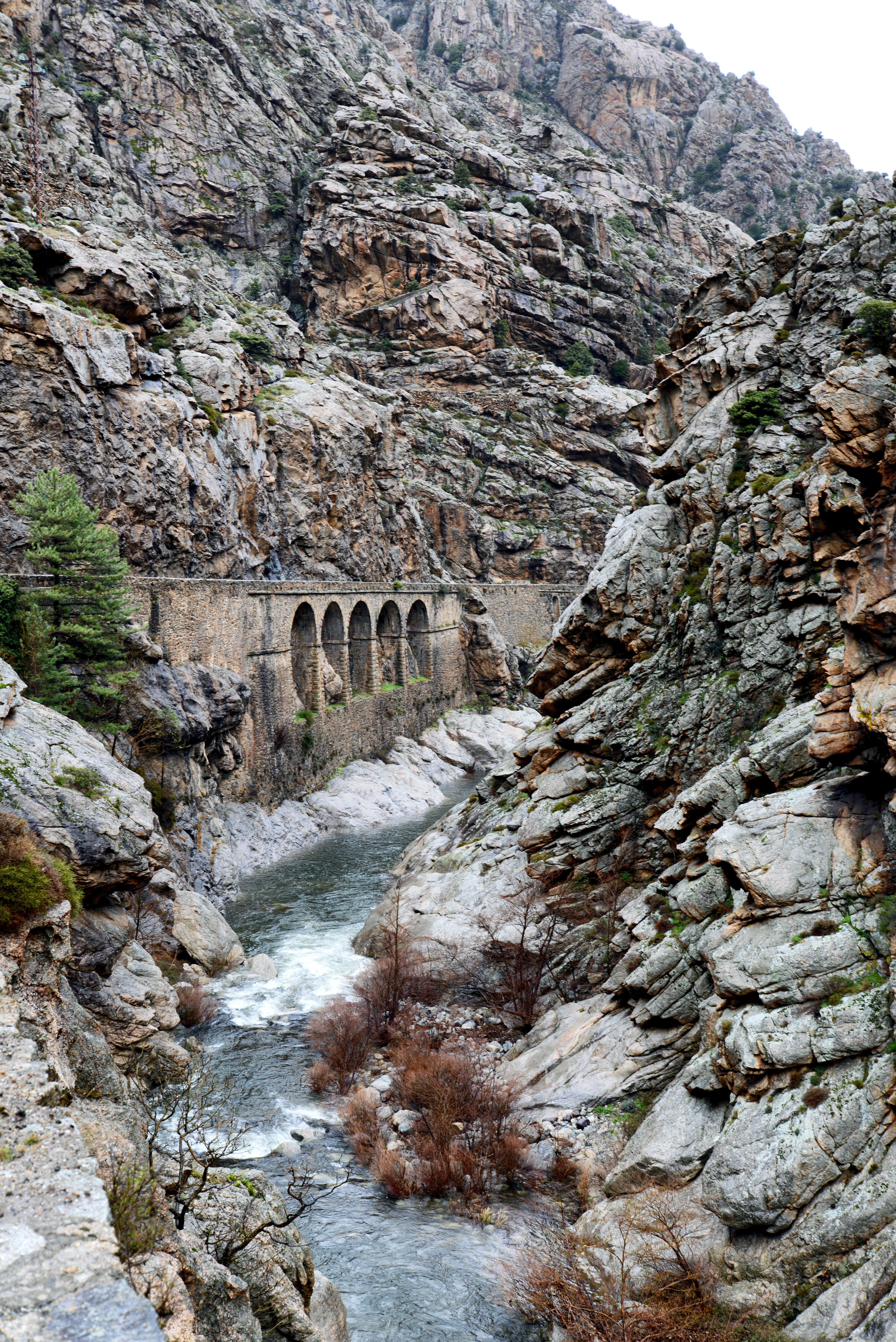 Corscia, Niolo (Haute-Corse) - Le Golo dans la Scala di santa Regina